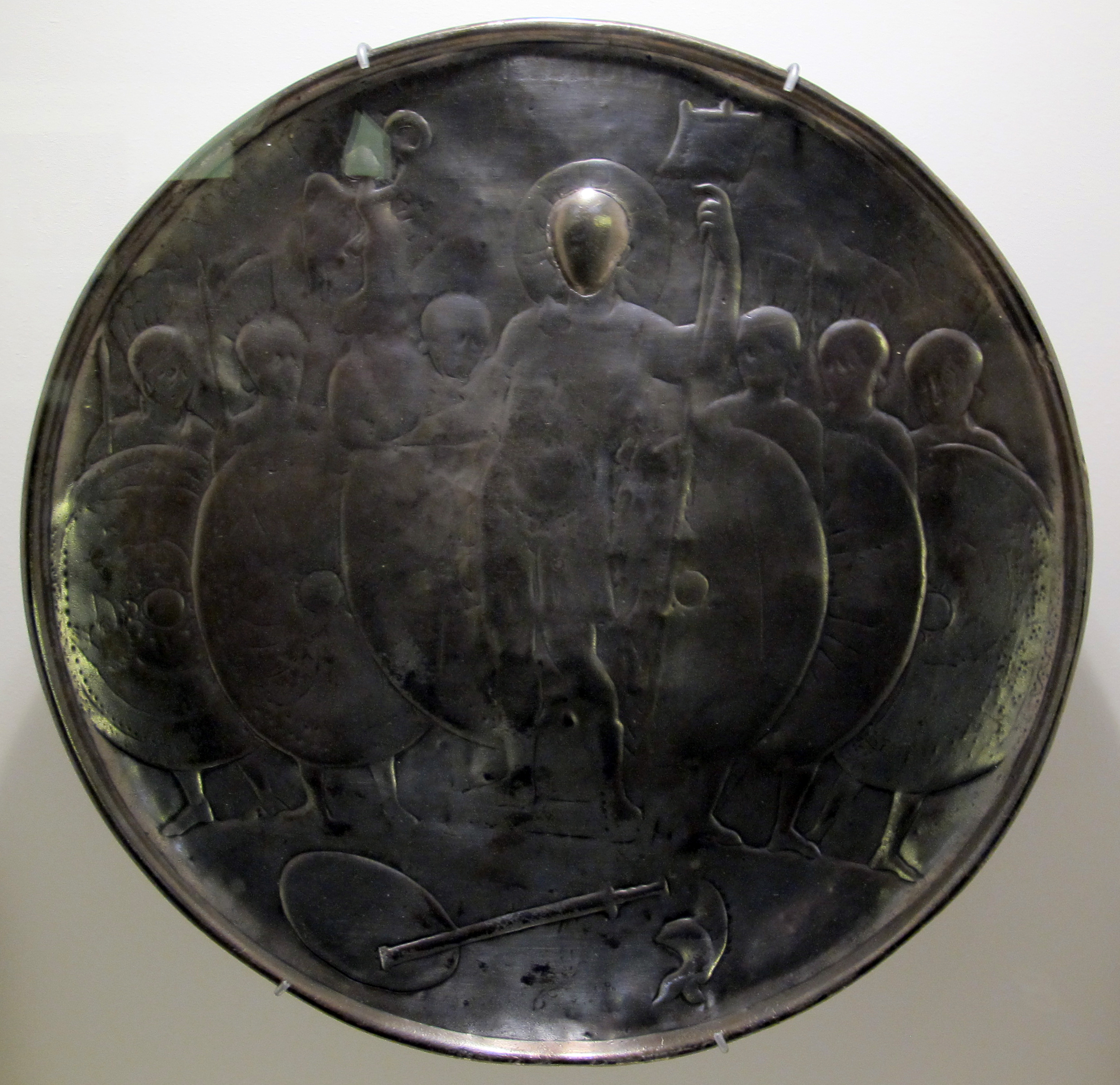 Musée d'art et d'histoire de Genève